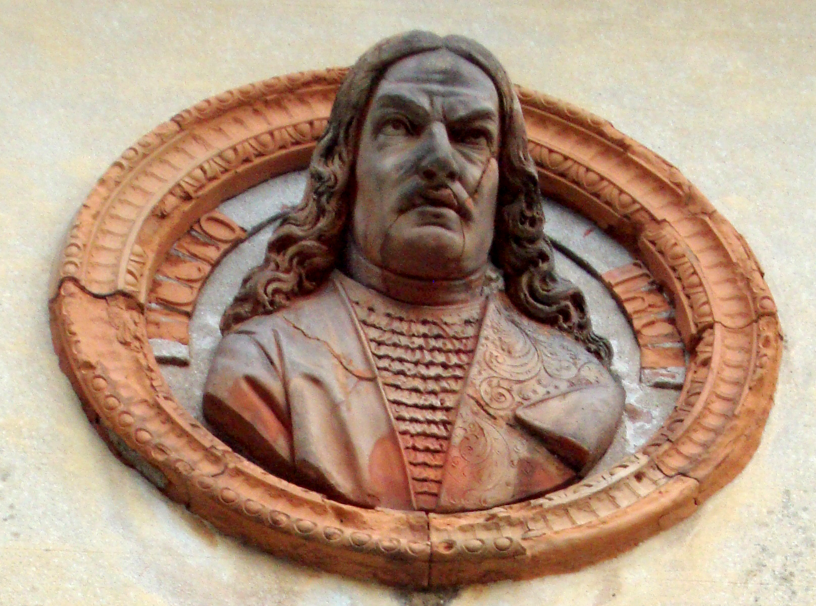 Schio, particolare della facciata del Teatro Jacquard This is a photo of a monument which is part of cultural heritage of Italy.